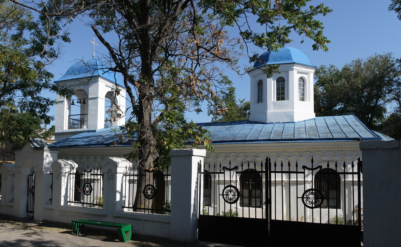 Feodosija Kirche